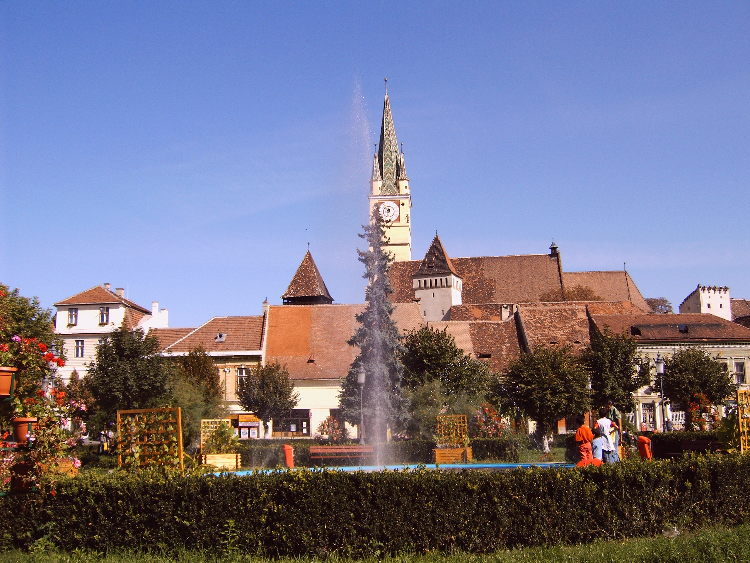 Město Mediaș v Rumunsku